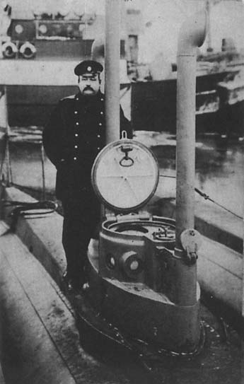 Подводник ВМФ Российской империи Иван Иванович Ризнич